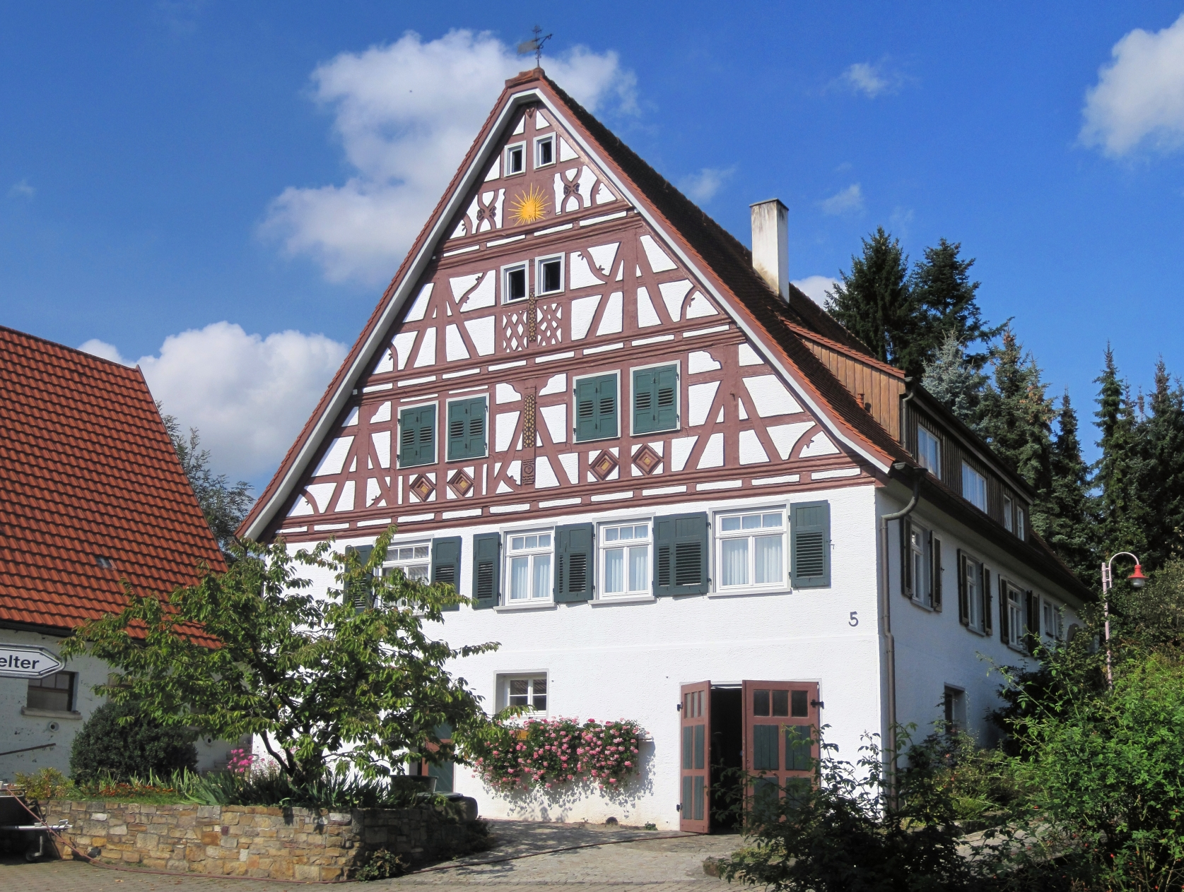 Fachwerkgebäude in Neckartailfingen, Schulberg 5. Zierfachwerkbau, am rundbogigen Kellereingang mit 1680 bezeichnet.